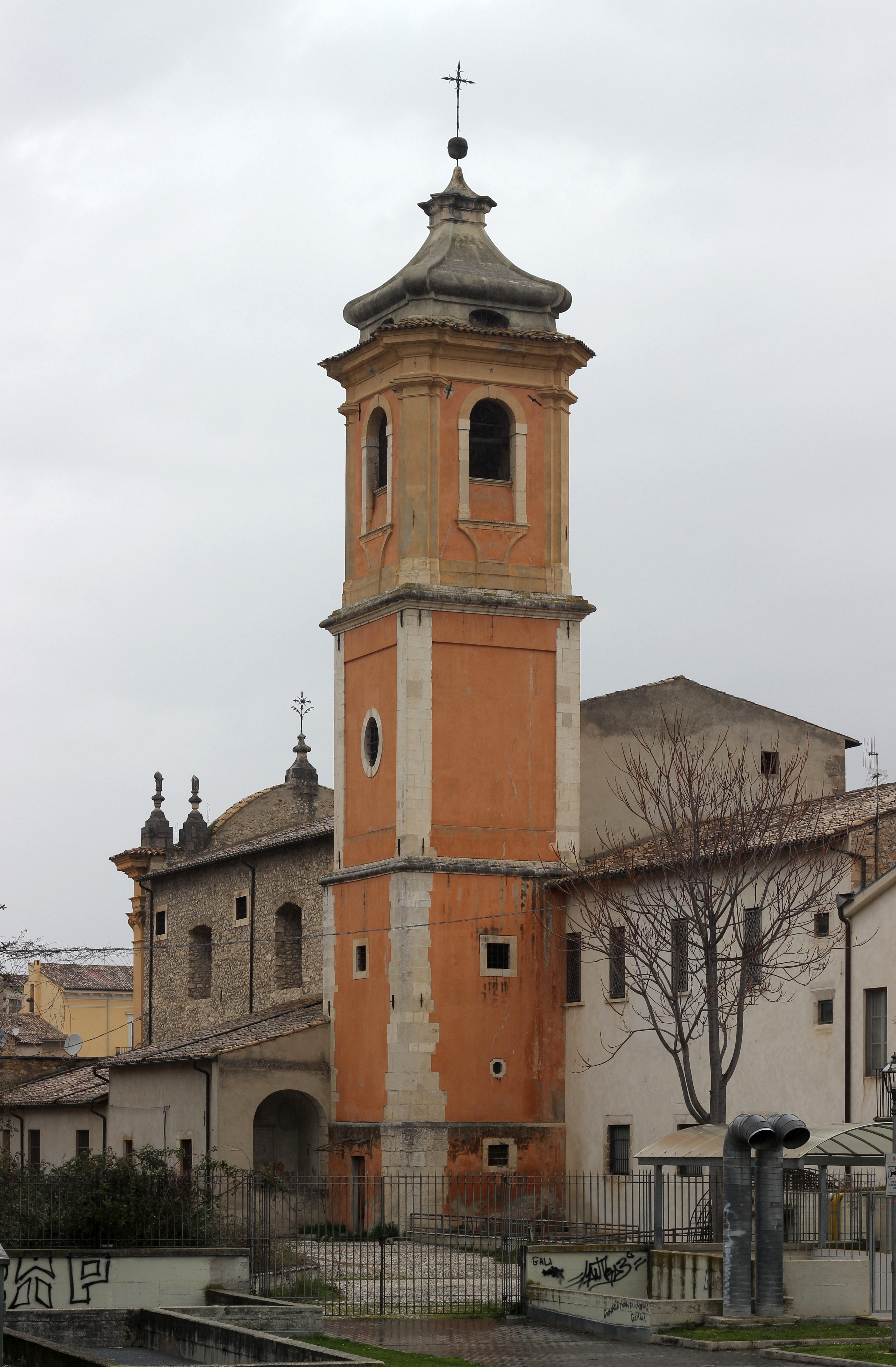 Turm von Santa Chiara in Sulmona